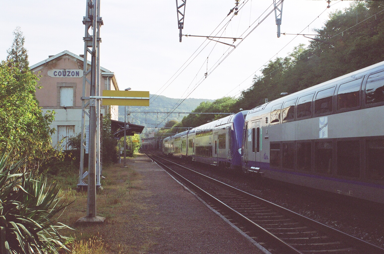 Une unités multiple de Z 24500 sur un TER Lyon - Mâcon en gare de Couzon